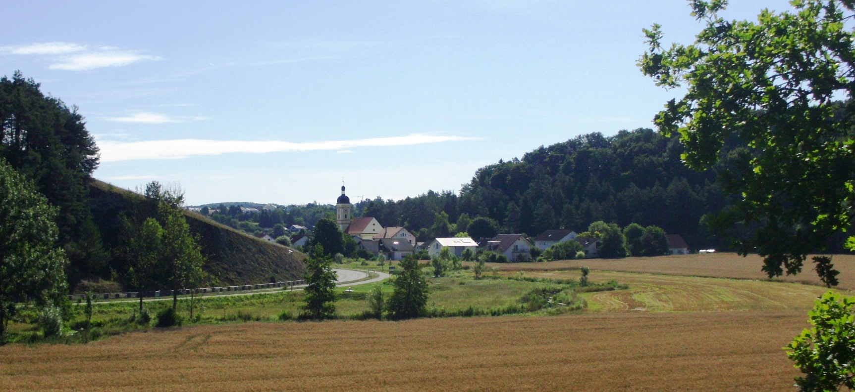 Sollern, Ortsteil von Altmannstein im oberbayerischen Landkreis Eichstätt